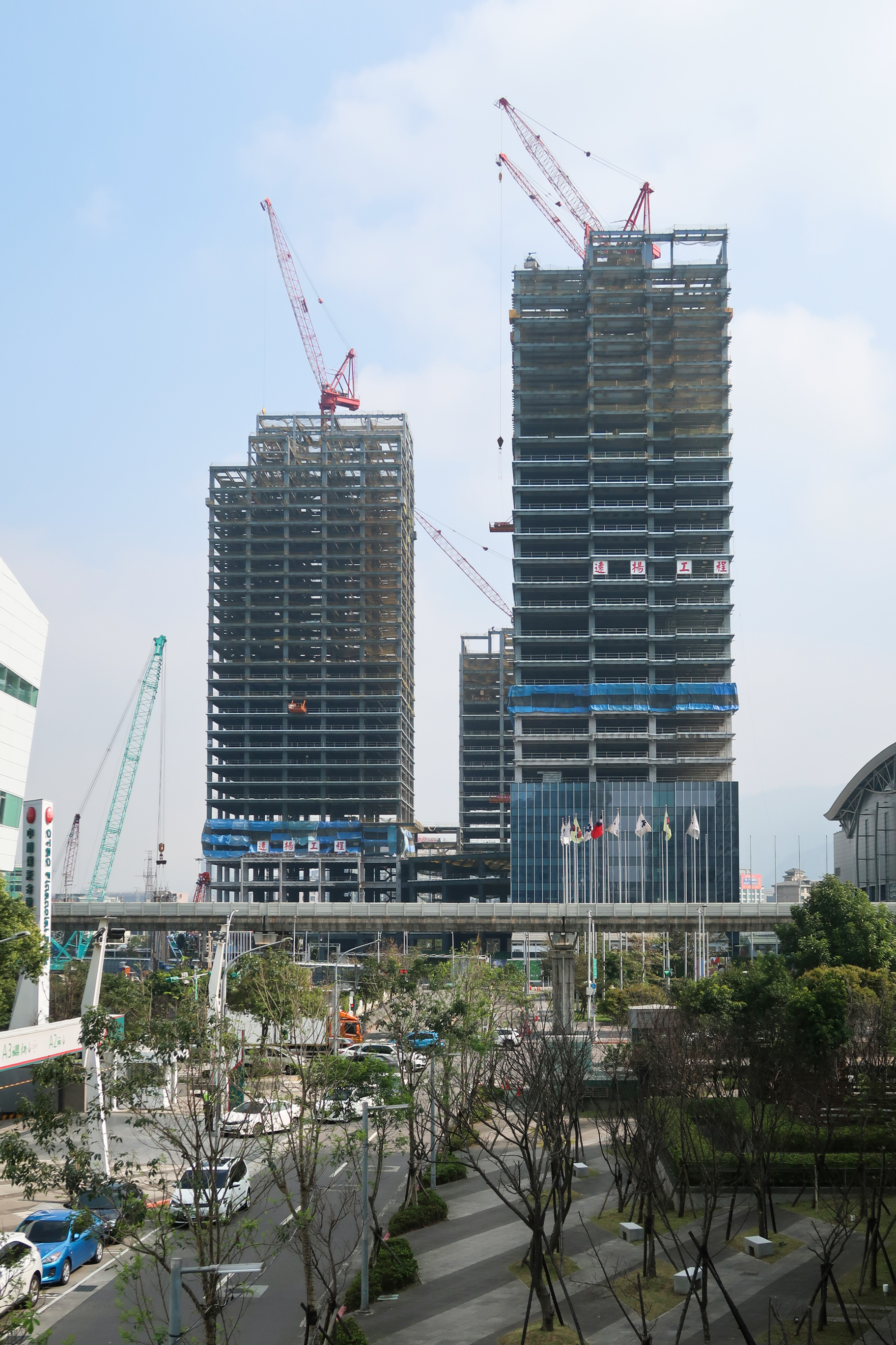 台肥C2 site